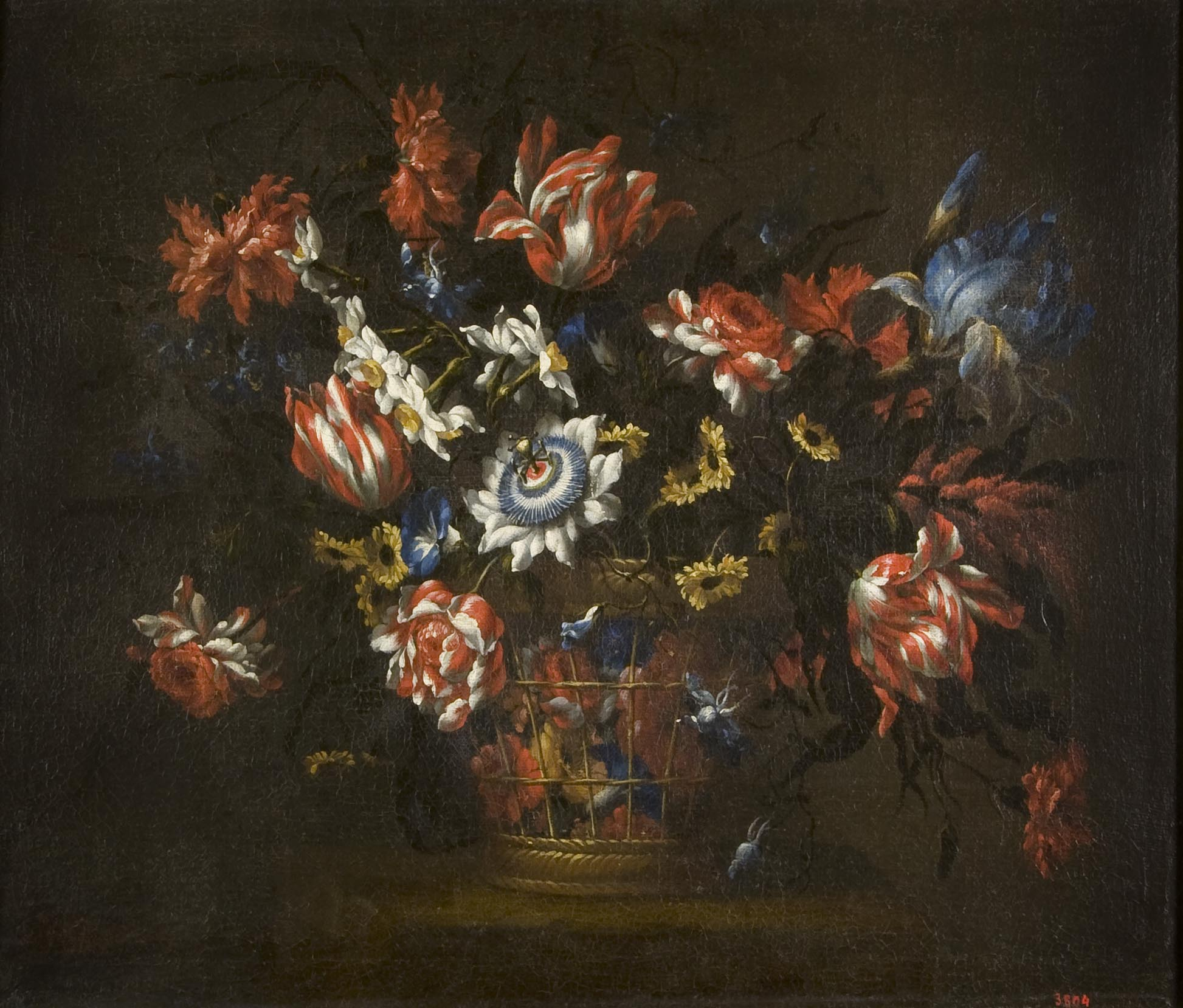 La obra es tracta de una natura morta configurada per un cistell de vímet ple de flors, situat damunt una petita taula. Hi trobem lliris, tulipes, blauets, roses, dàlies o cascalls, nadales, ginesta i branques florides d'ametller. Feta amb una pinzellada minúscula i molt detallista, s'observa un joc de clar-obscurs amb una gama cromàtica molt sòbria.